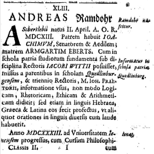 Auszug aus Zeumer 1731